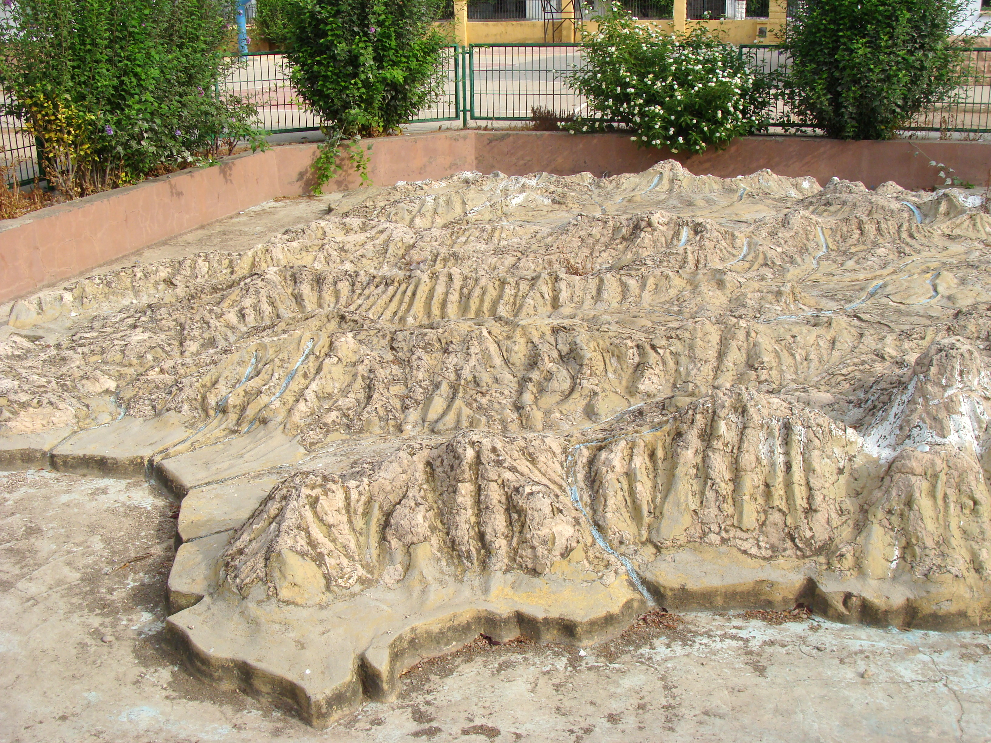 Mapa en 3D que muestra las principales formas del relieve de gran parte de la Península Ibérica. En primer lugar se ve el Sistema Penibético, 2º Valle del Guadalquivir, 3º Sierra Morena, 4º submeseta Sur y valles del Guadiana y del Tajo, 5º la meseta del Duero y los Montes Cantábricos. Puede verse arriba a la derecha parte del río Ebro que se dirige hacia el Este.